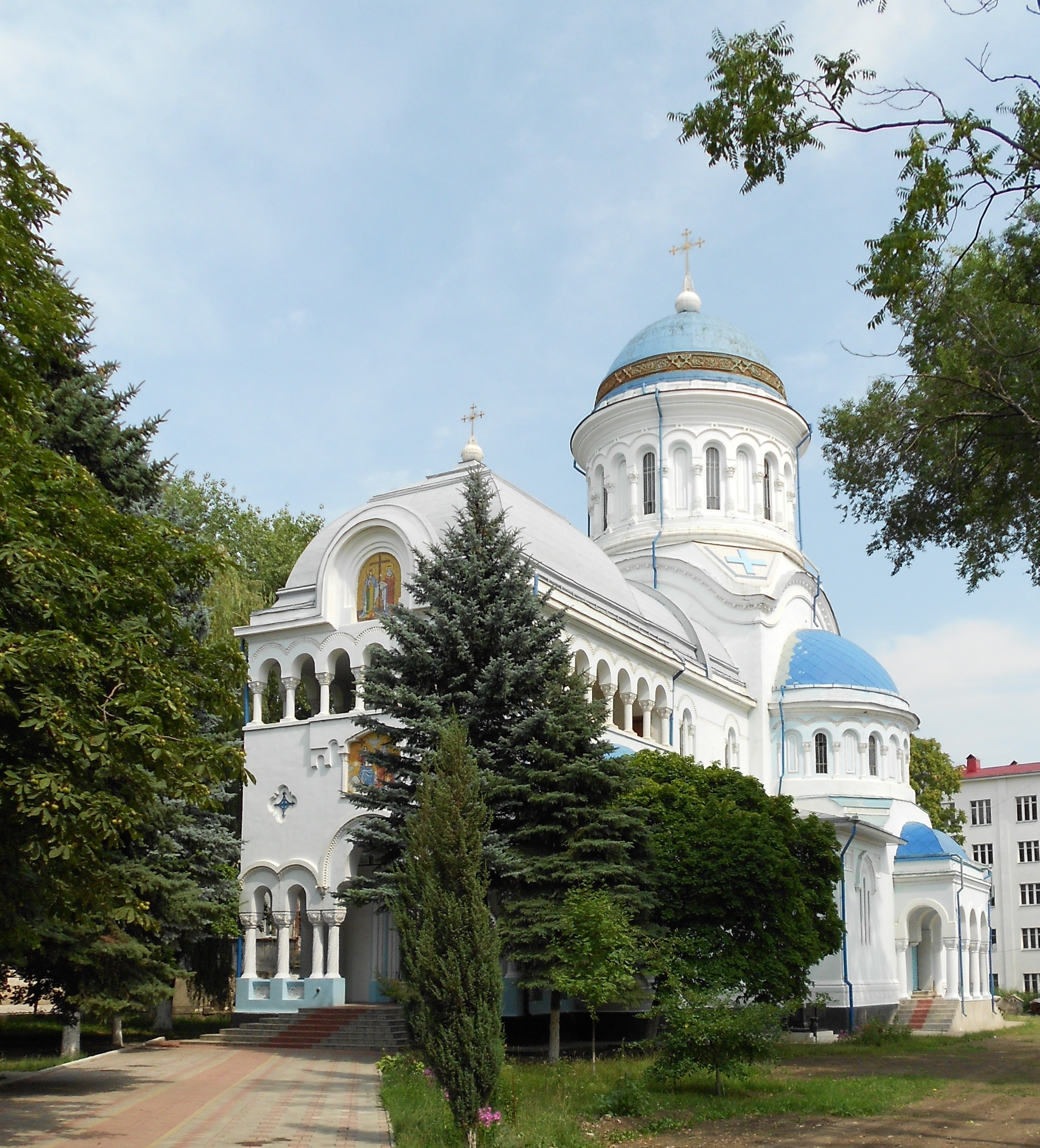 Catedrala Sf. Constantin și Elena din Bălți